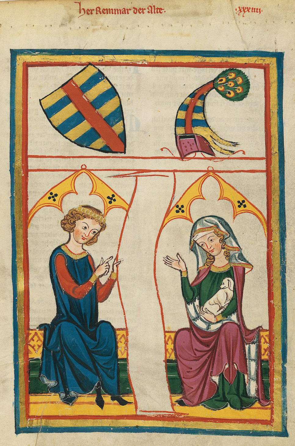 Codex Manesse, UB Heidelberg, Cod. Pal. germ. 848, fol. 98r: Herr Reinmar der Alte